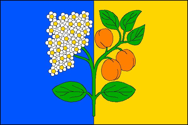 Vlajka obce Prackovice nad Labem